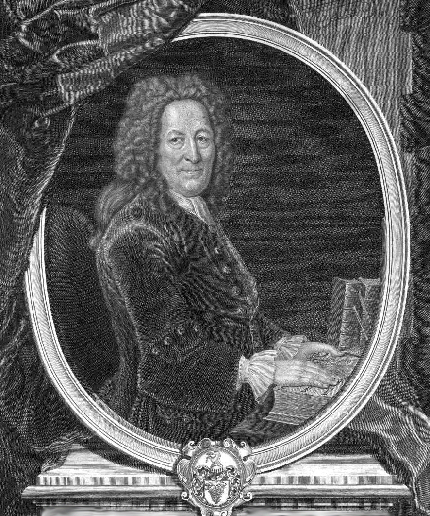 Portrait Friedrich Hoffmann